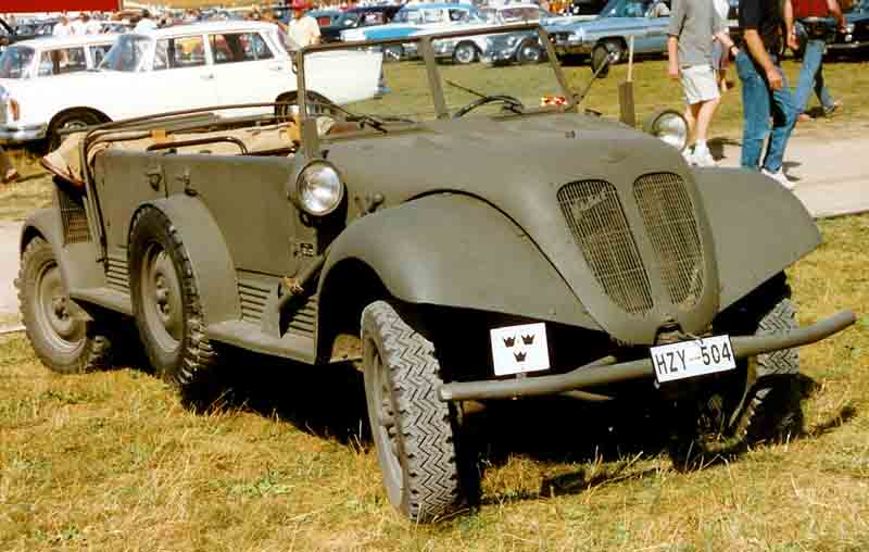 Tempo Vidal G1200 1939